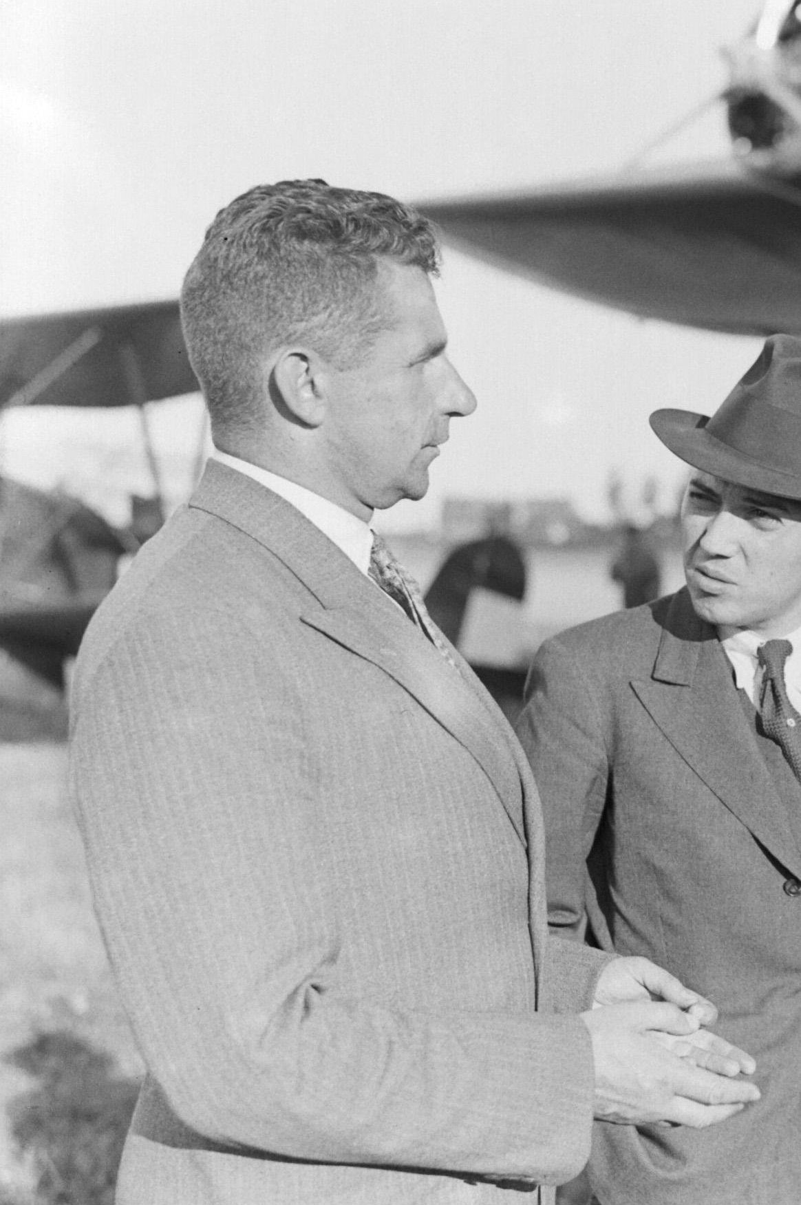 De heer Alksins chef van de Russische luchtmacht op de luchthaven Schiphol